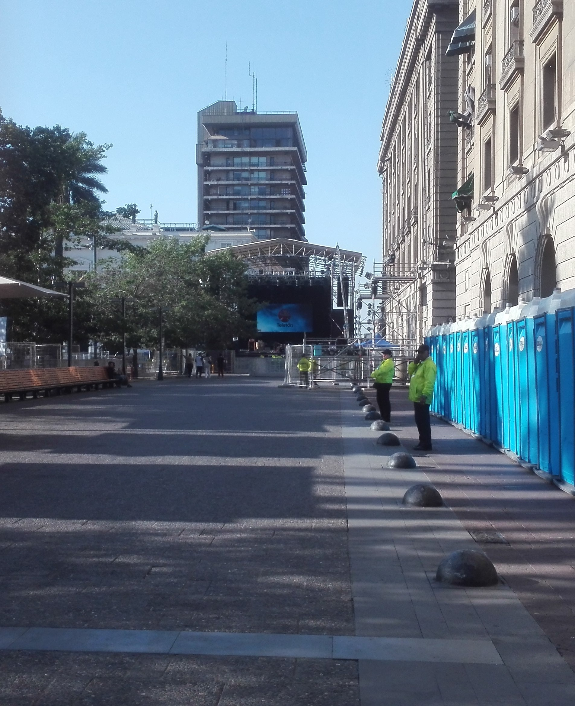 Escenario de la Teletón Chile 2016 en la Plaza de Armas de Santiago.